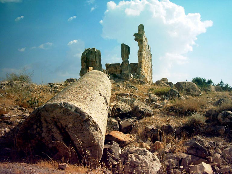 معبد روماني اعتاد اهل البلدة على تسميته بالقلعة او الحصن ويعود تاريخيه الى الحقبة الرومانية